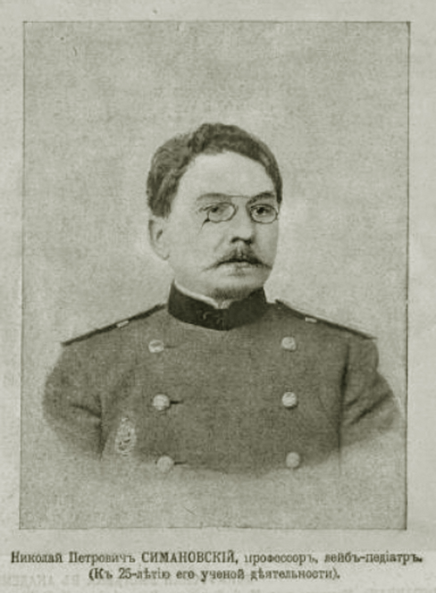 Академик Симановский Николай Петрович